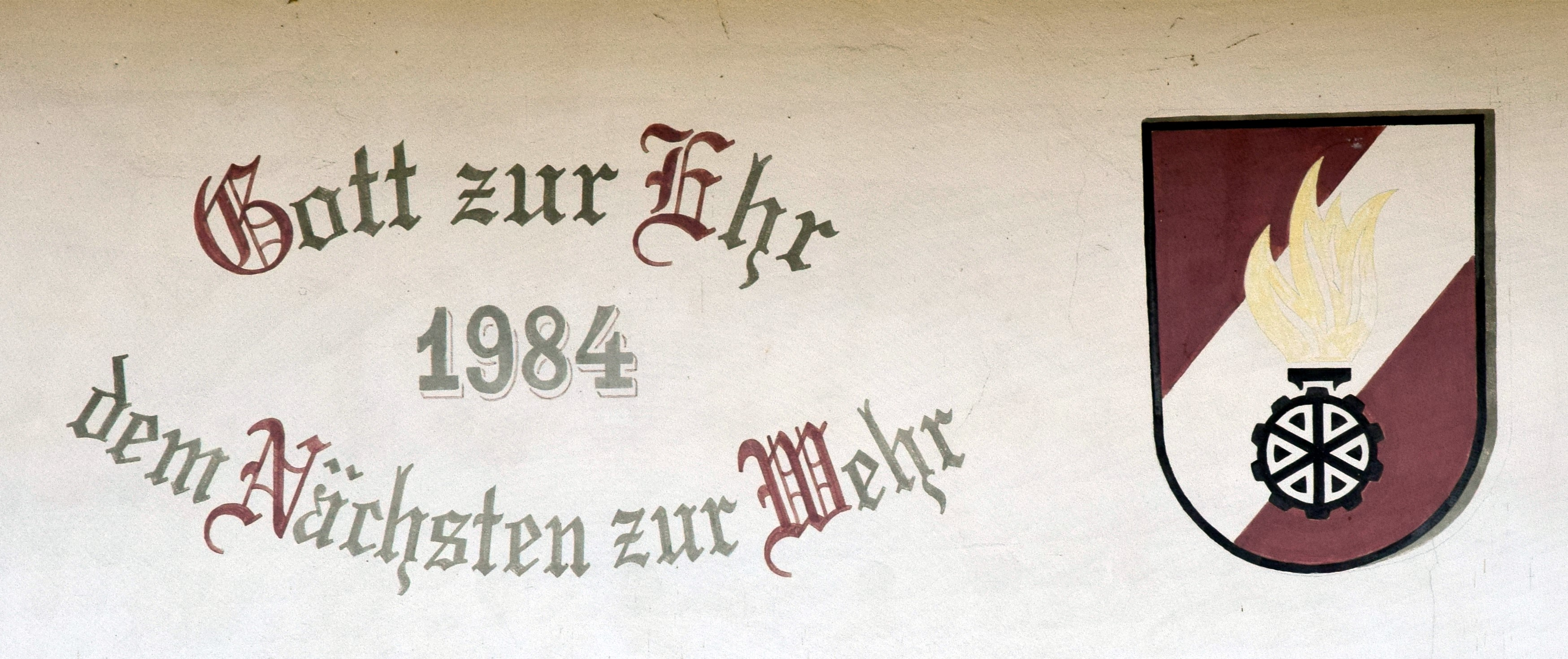 Detail des Zeughauses der FF Frauendorf an der Schmida